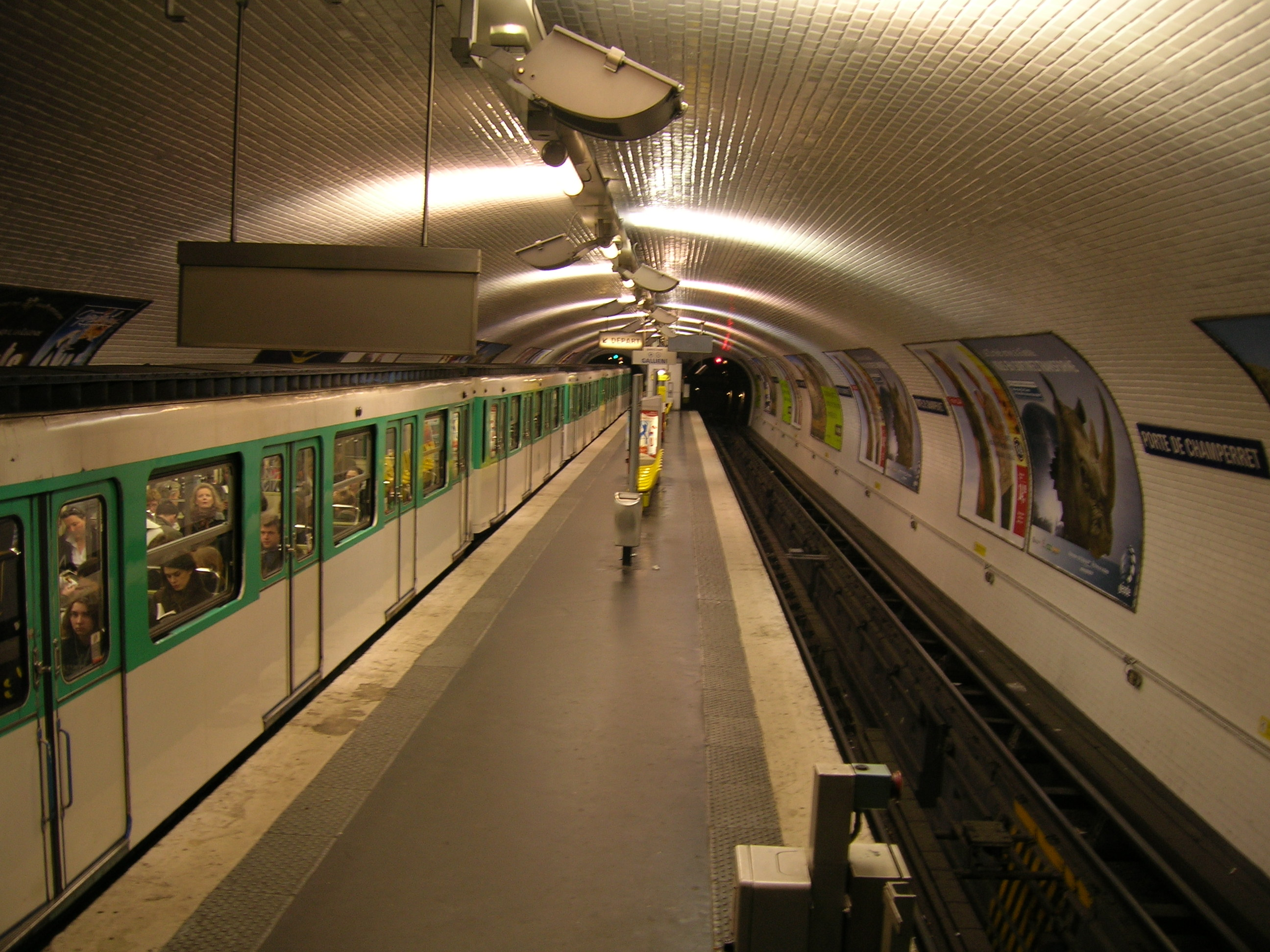 Demi-station Porte de Champerret au niveau des quais direction Galliéni